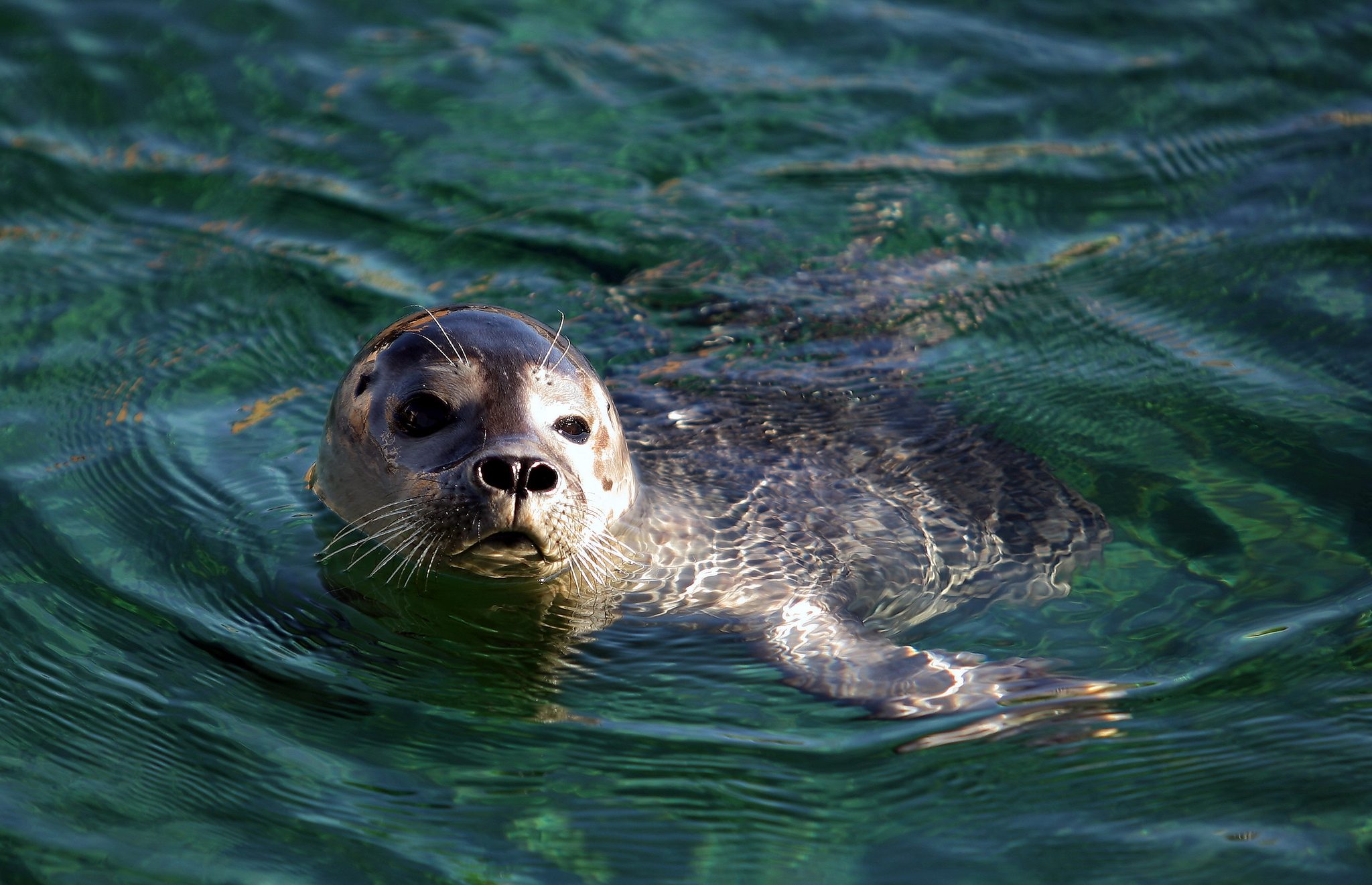 Ciudad de las Artes y las Ciencias. Valencia.